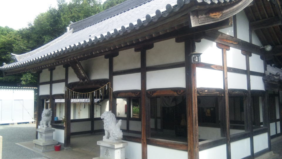 兵庫県姫路市の男山にある男山八幡宮の拝殿。